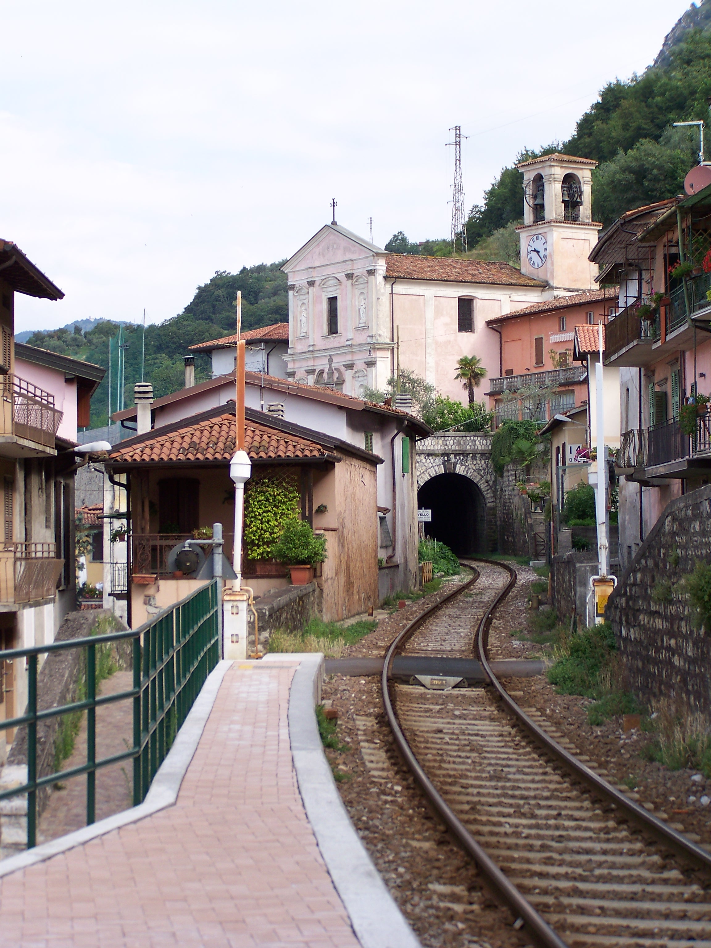 La Chiesa di Sant'Eufemia di Vello e l'ingresso della galleria ferroviaria "Vello" della Brescia – Iseo – Edolo.